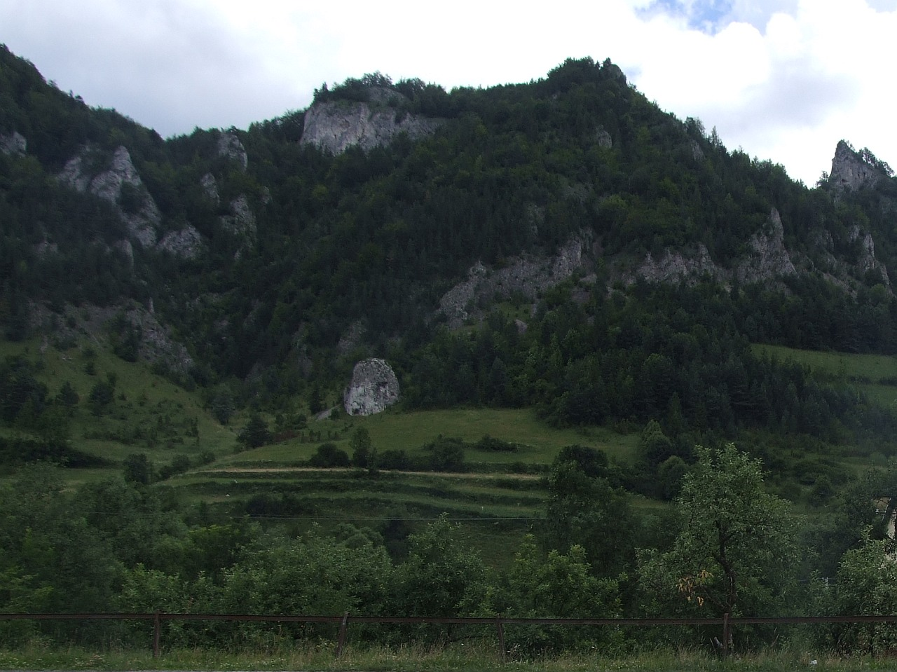 Haligowskie Skały w słowackich Pieninach